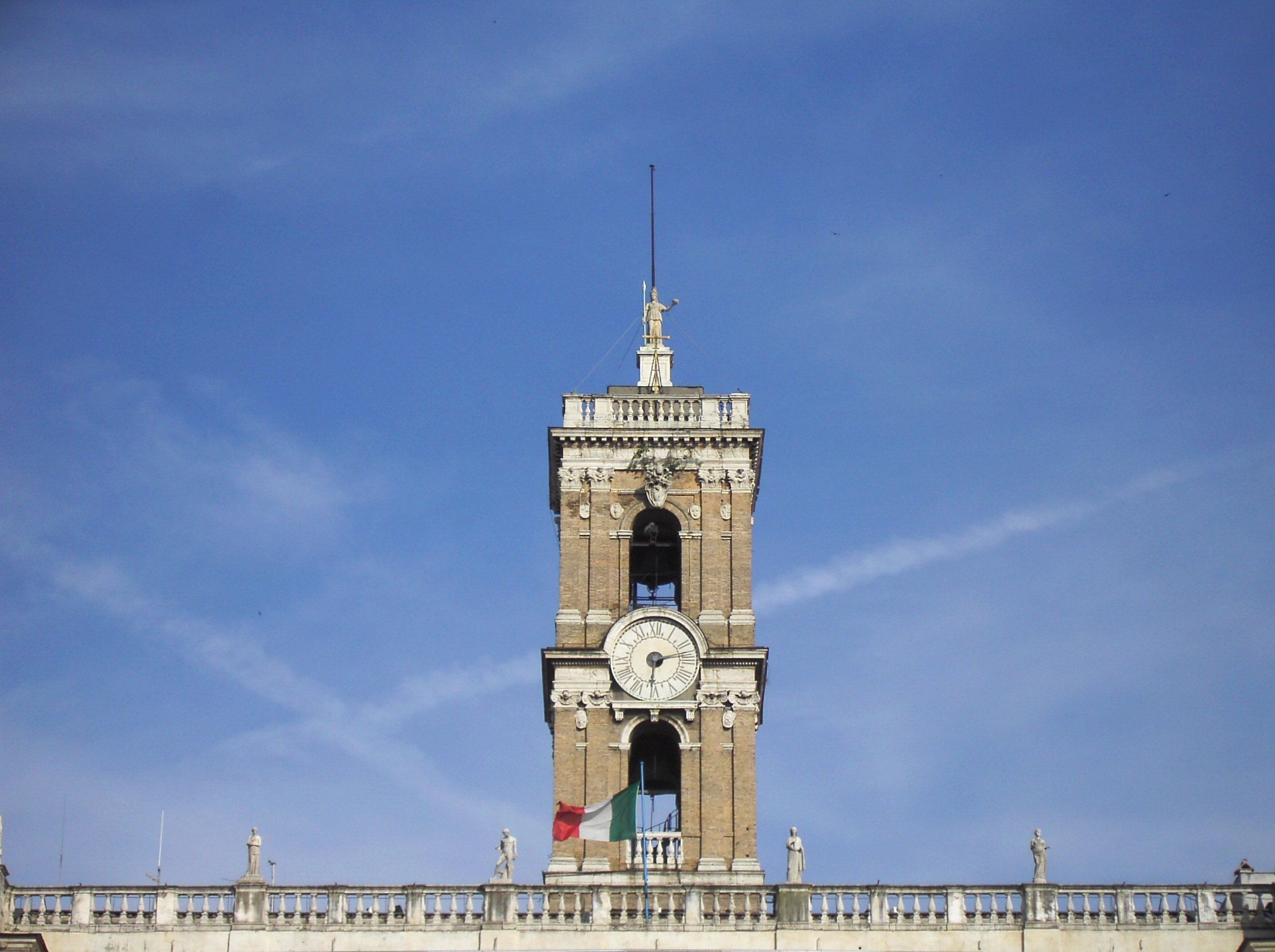 Roma, campidoglio: la Torre campanaria (detta della Patarina)